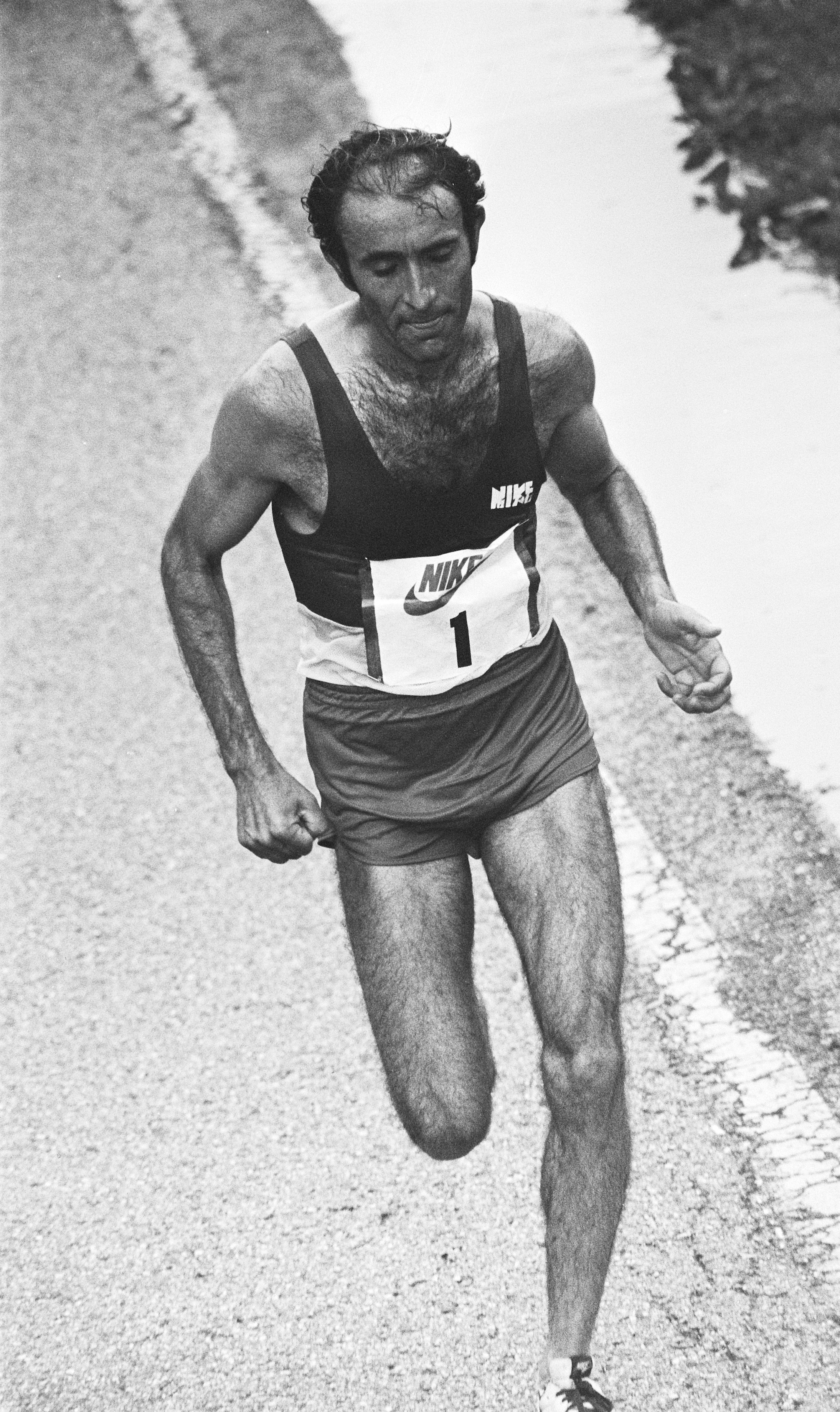 Tweede Rotterdam marathon; winnaar Rodolfo Gomez (Mexico) in aktie